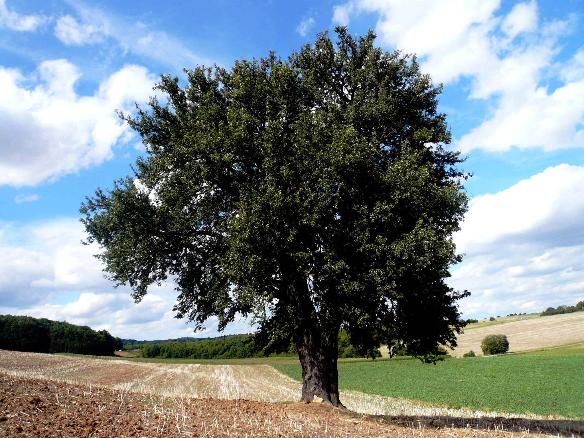 Birnbaum am Lerchenberg bei Wasserlosen. Die Wildbirne (Pyrus pyraster) hat einen Stammumfang von 4,6 Meter und etwa 17 Meter Kronendurchmesser und Höhe. Sie ist bei der Unteren Naturschutzbehörde des Landkreises Schweinfurt mit der Bezeichnung ND-05801 als Naturdenkmal gelistet.